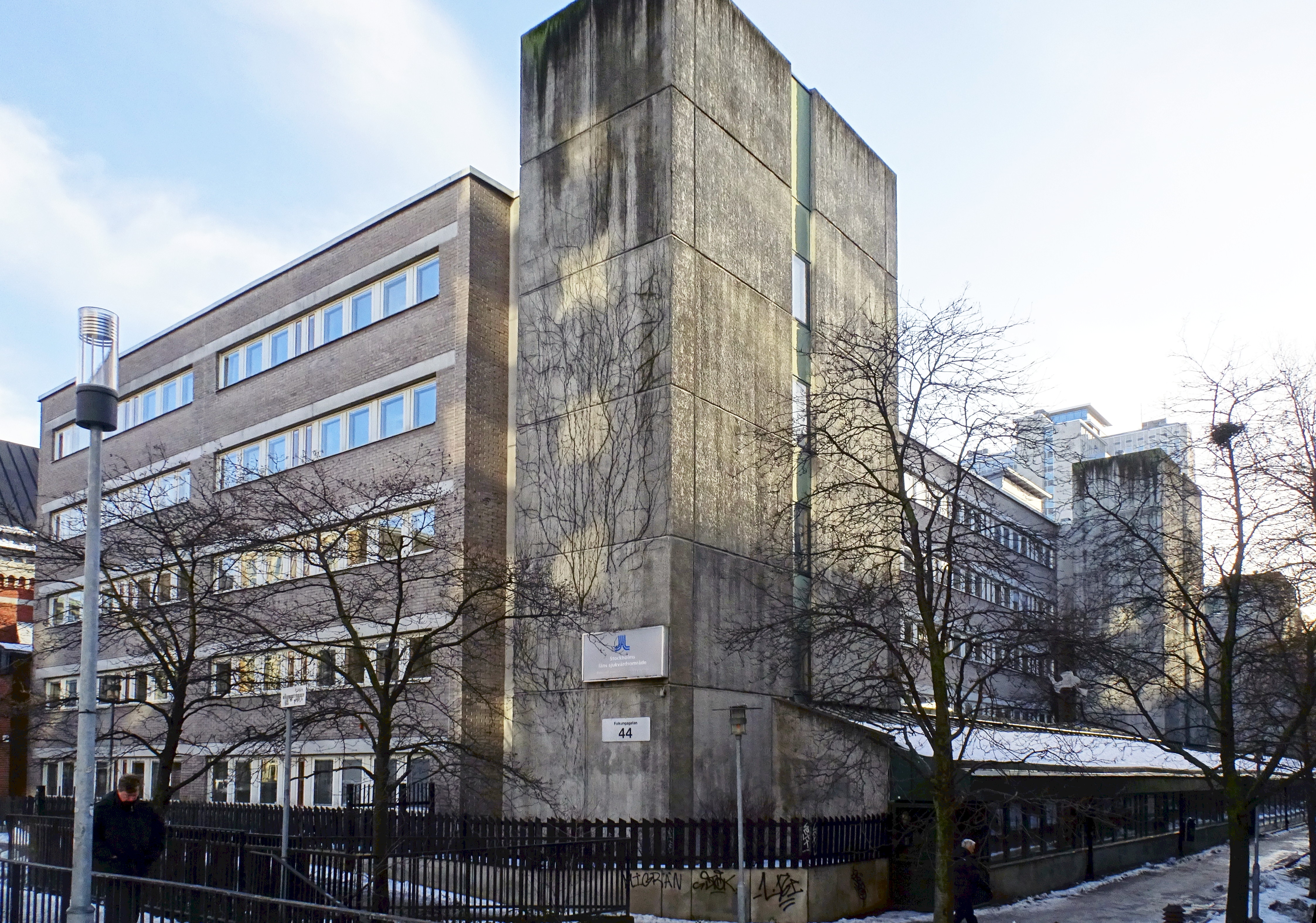 Kontorshus i fastigheten Nattugglan 14, Folkungagatan 44